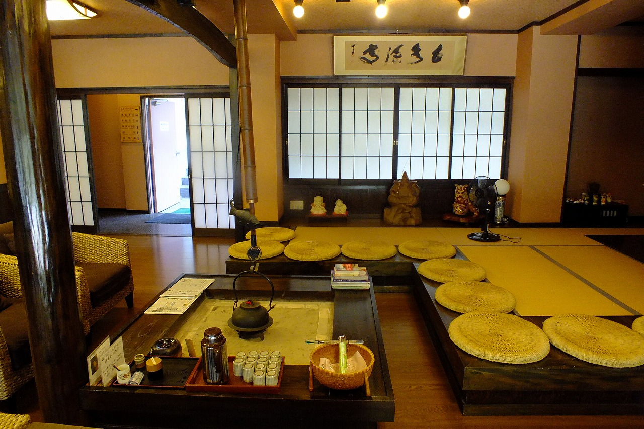 2015-10-01 Sioda-Onsen Ueyama Ryokan（湯元上山旅館）